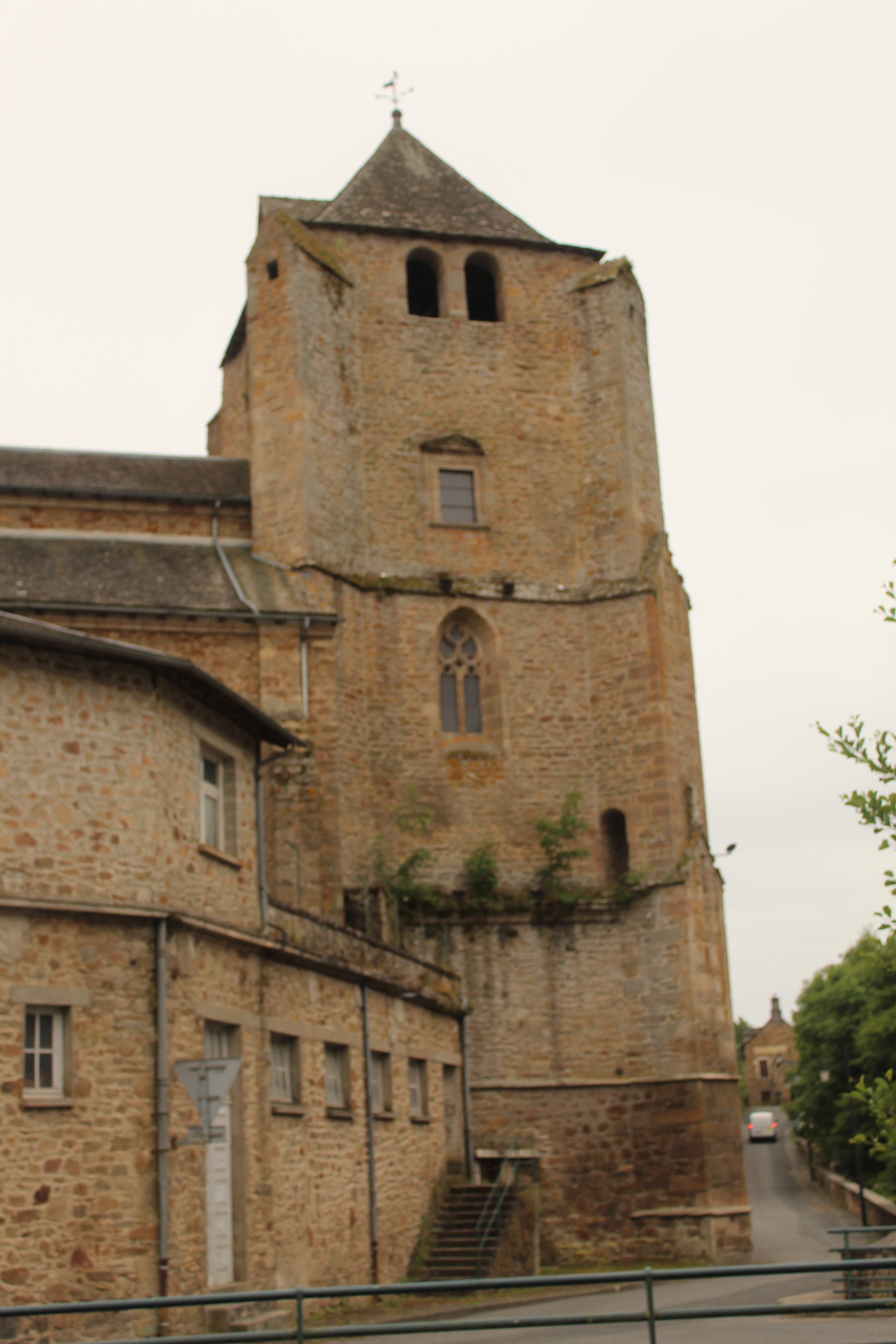 L'église